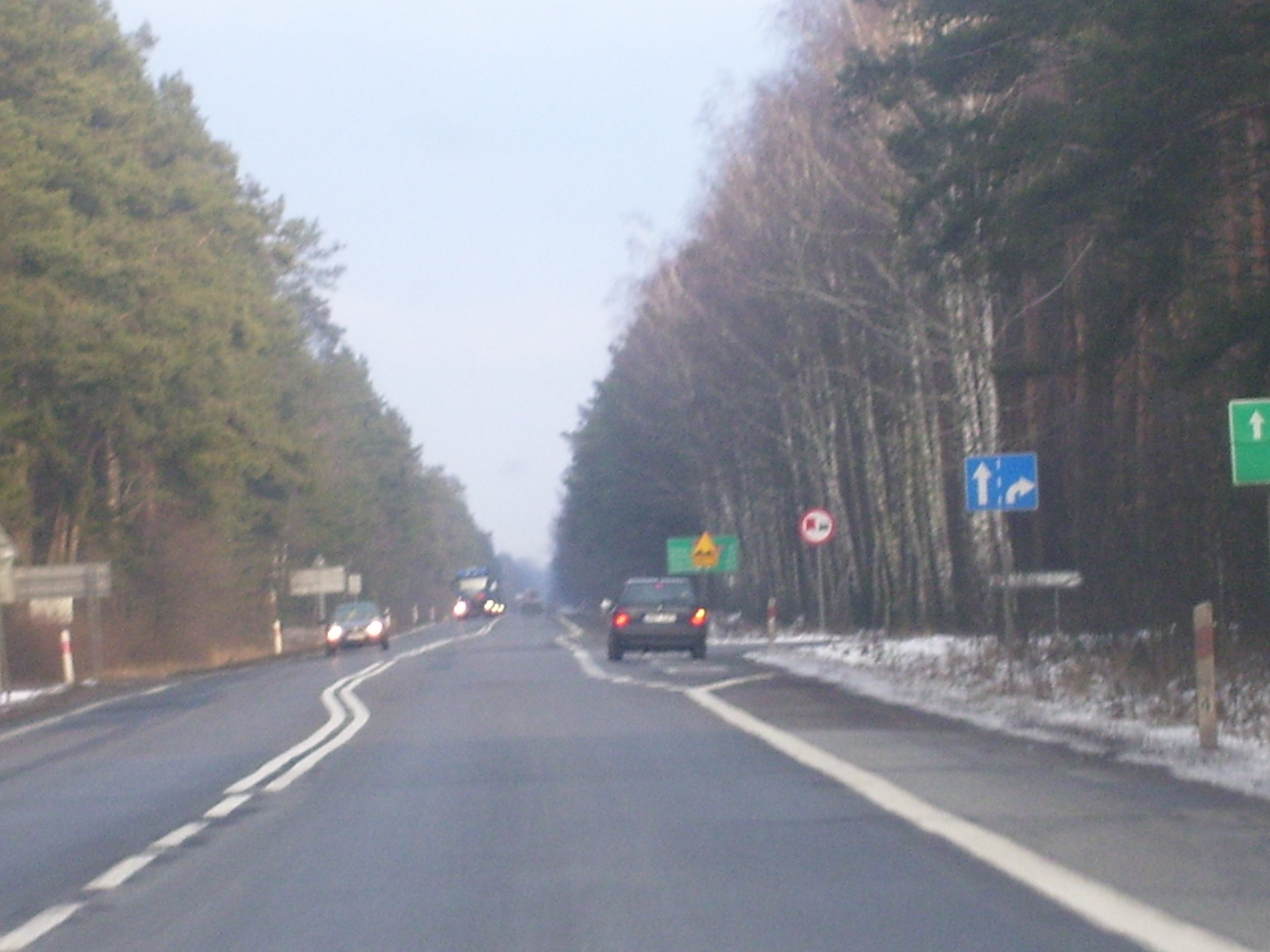 Skrzyżowanie DK8 z DW694